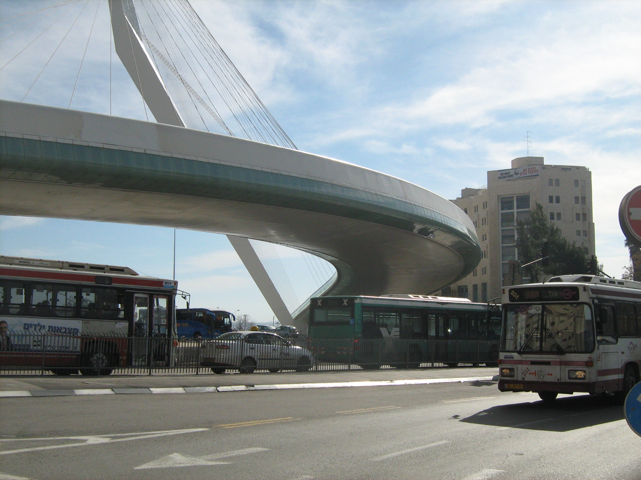 גשר המיתרים